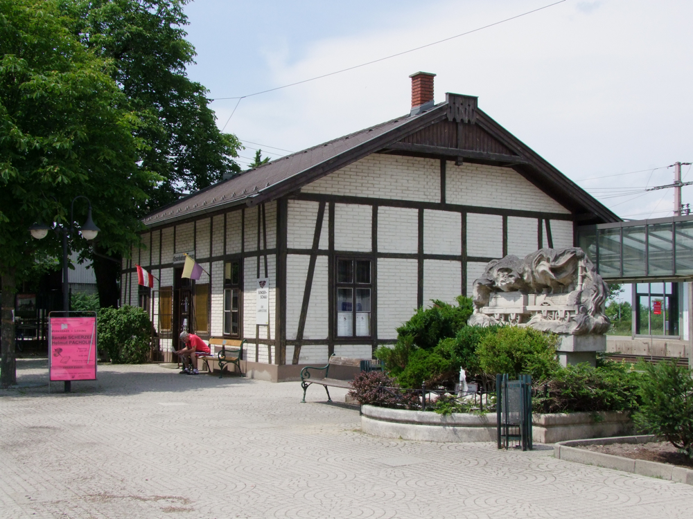 Deutsch Wagram Eisenbahnmuseum ehemaliger Arbeiterwarteraum